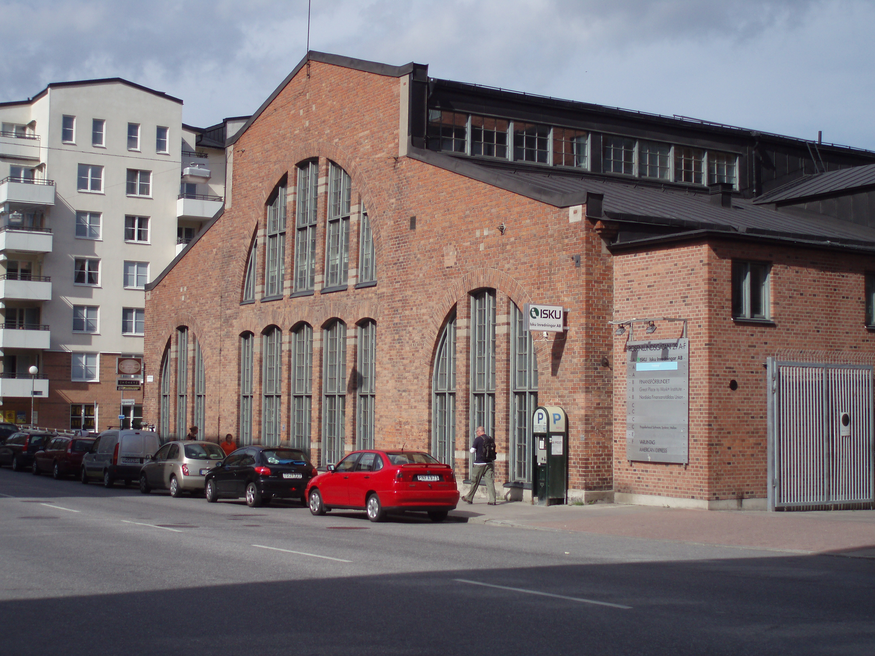 Luth & Roséns f.d. gjuteri vid Rosenlundsgatan i Stockholm den 31 juli 2006. Fotograf: Användare:Cucumber.